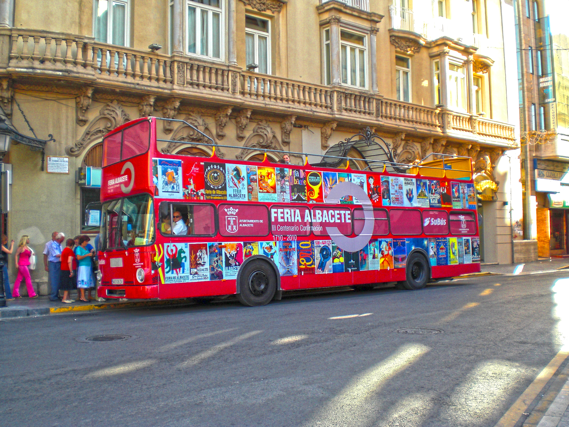 Autobús turístico dos plantas Albacete